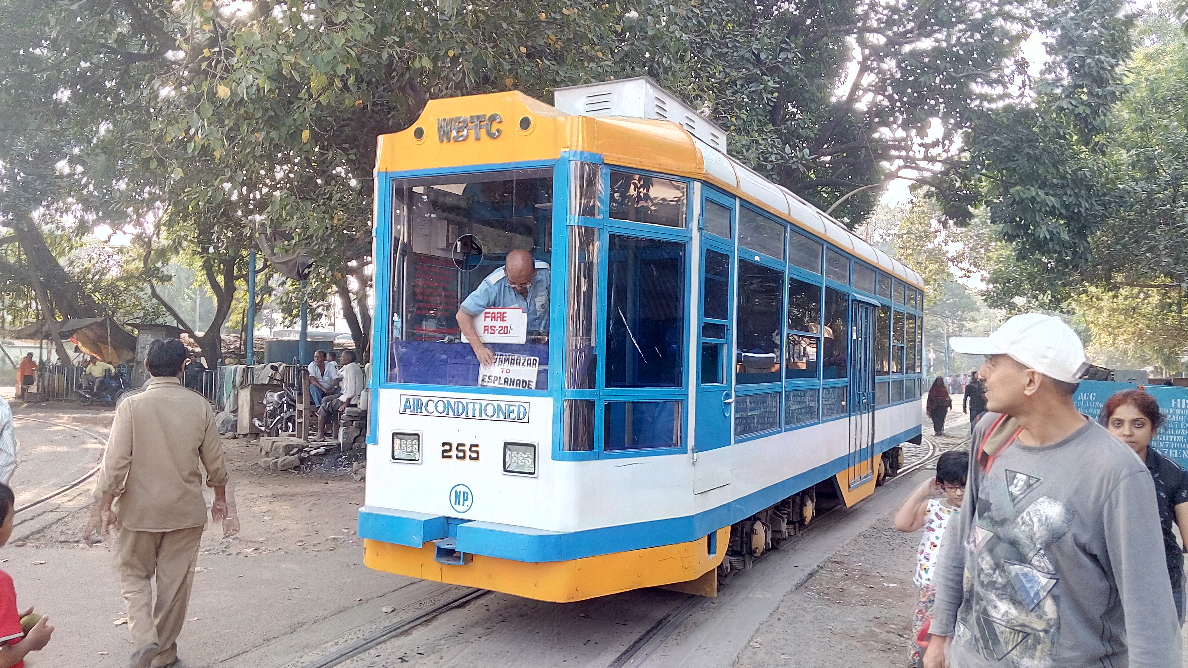 সম্প্রতি পশ্চিম বঙ্গ পরিবহন নিগম,ট্রাম প্রেমী ও নিত্য যাত্রীদের কথা মাথায় রেখে, ধর্মতলা ও শ্যামবাজার রুটে এই এক কামরার এসি ট্রাম পরিষেবা চালু করেছে।